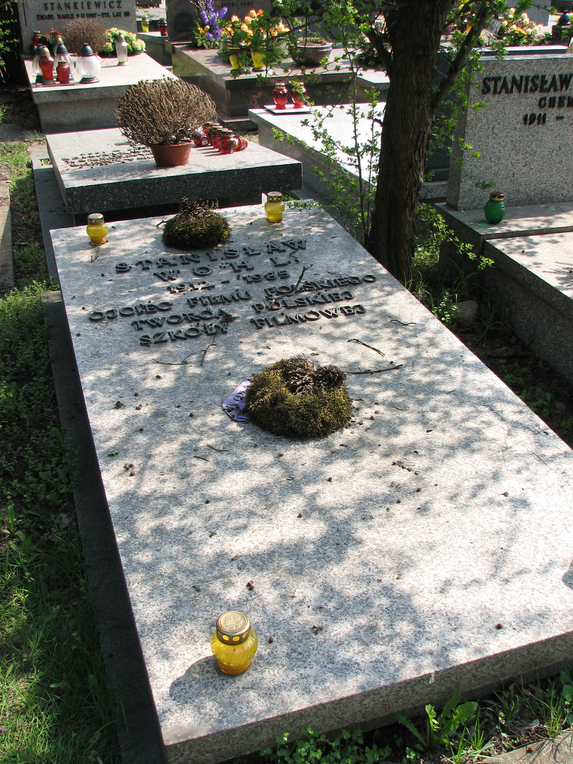 Stanisław Wohl (operator) grób - Warszawa, Cmentarz Wojskowy na Powązkach.